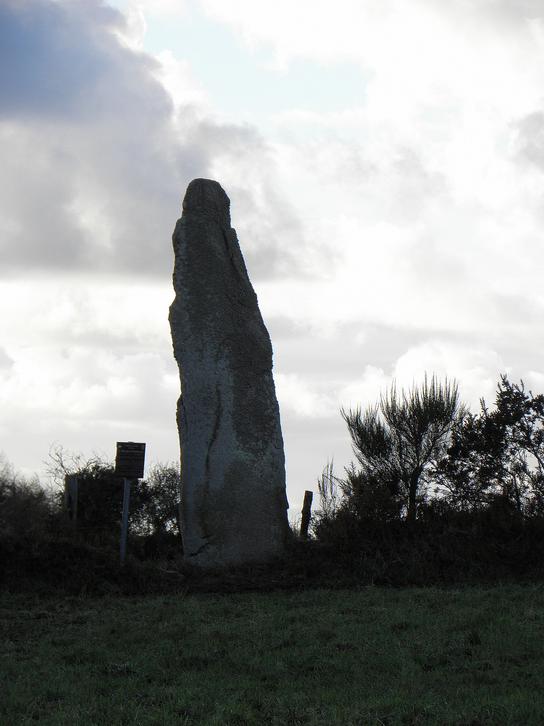 Menhir de Kerellou en Guerlesquin (29).